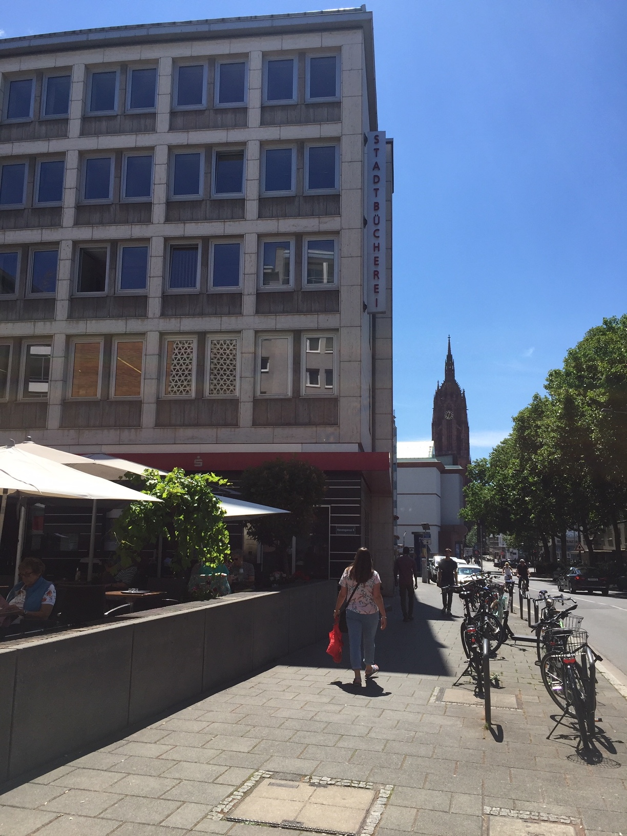 Frankfurt am Main, Hasengasse 4, Büro des Frauenreferats der Stadt in der 3. Etage über der Stadtbücherei.